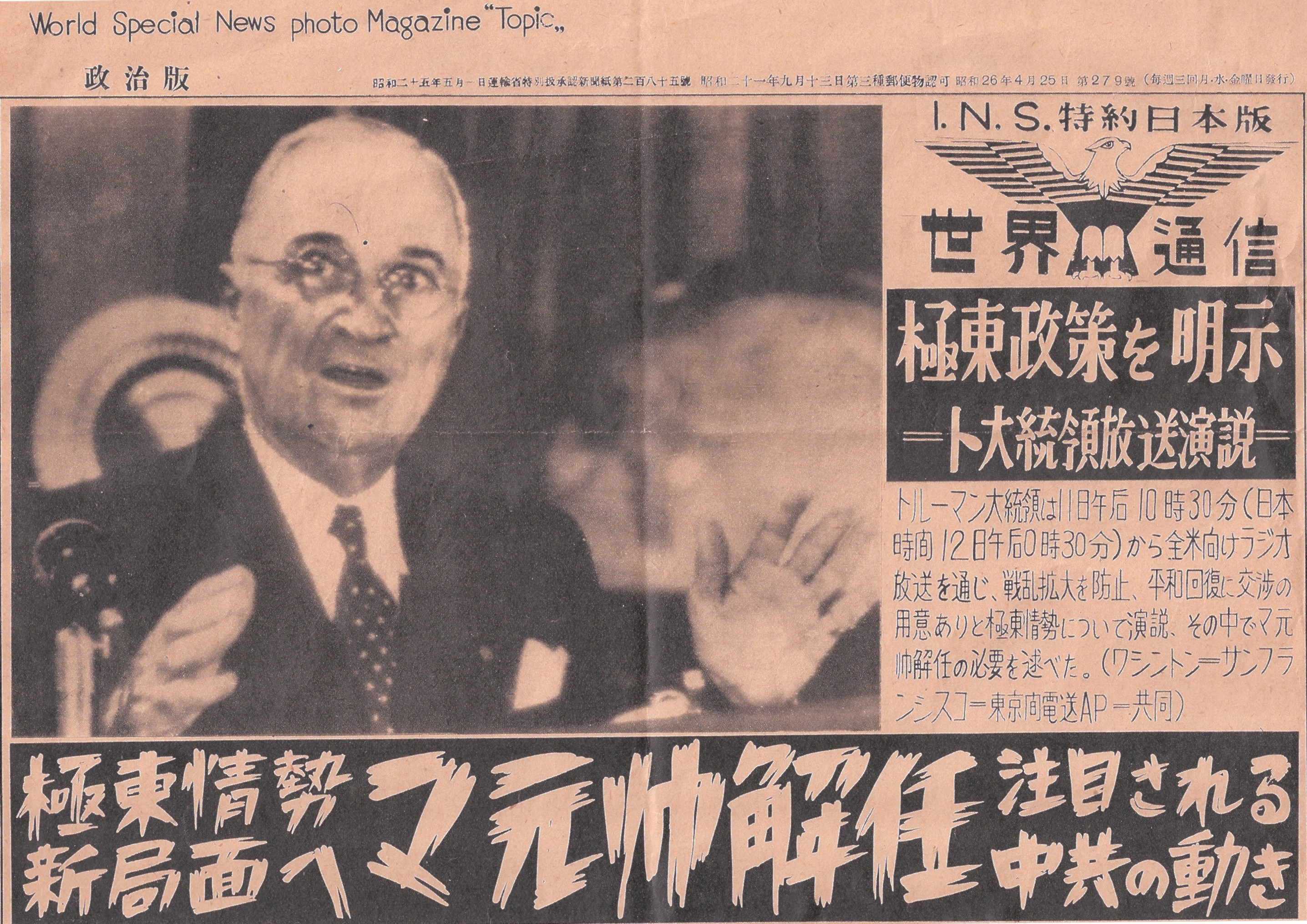 マッカーサー解任理由を述べるトルーマン大統領